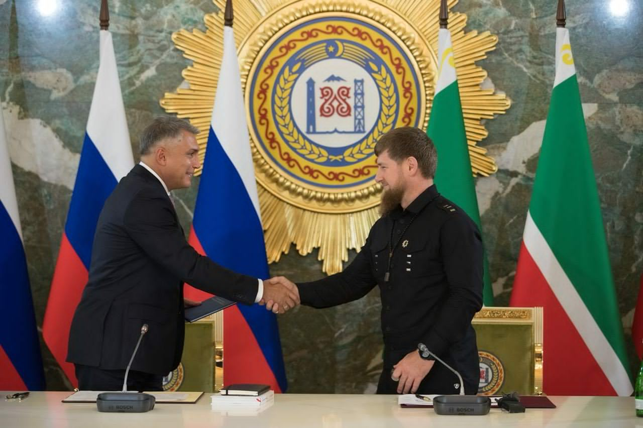 Полномочный представитель Президента РФ в СКФО совершил рабочую поездку в Чеченскую Республику.